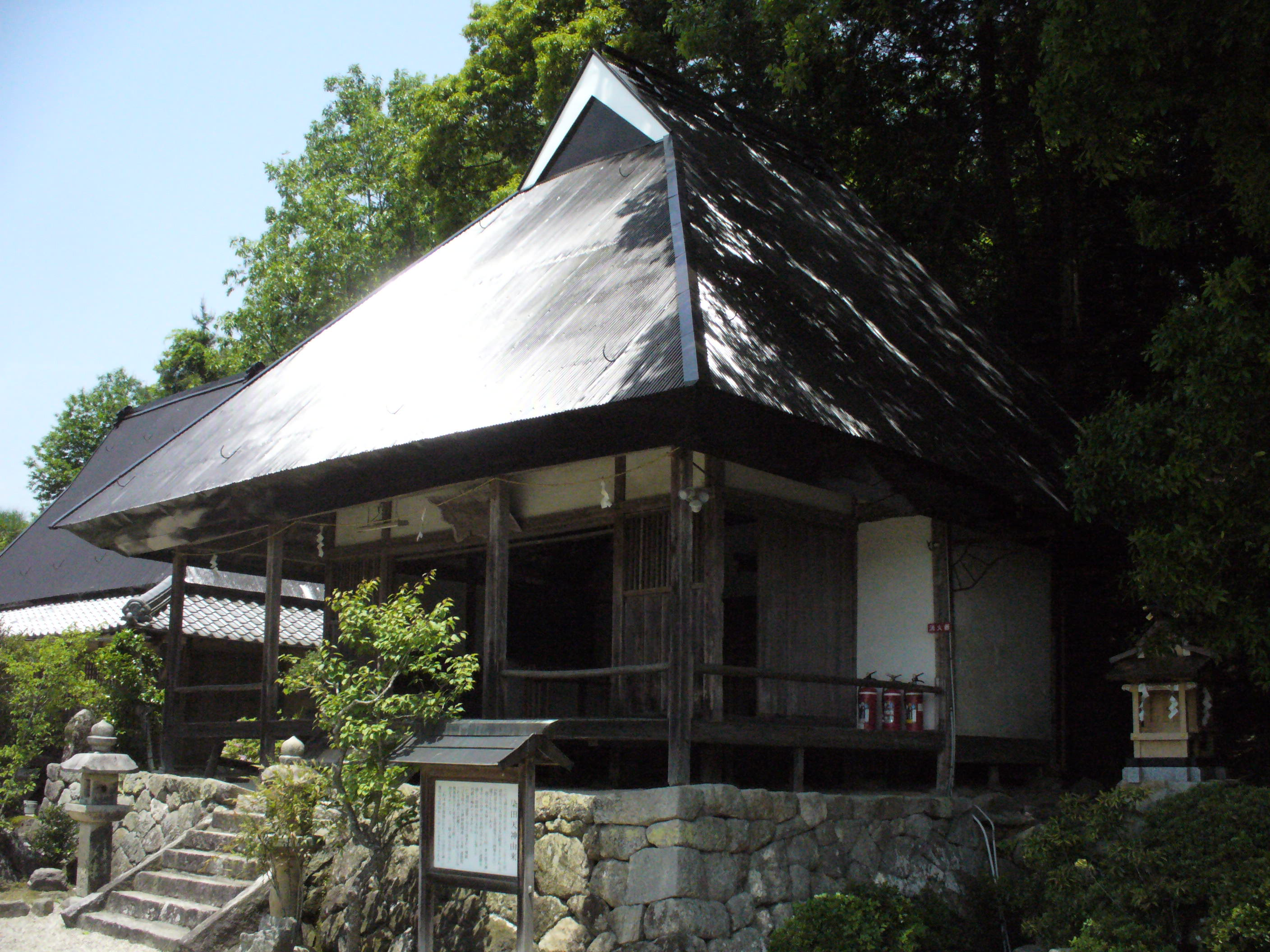 Photograph of Someda Tenjinkou Rengadou, taken in Uda city (Murou mura), Nara, Japan.